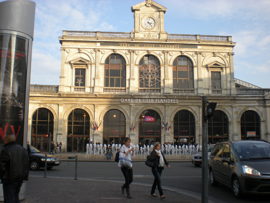 Façade de la gare de Lille-Flandres